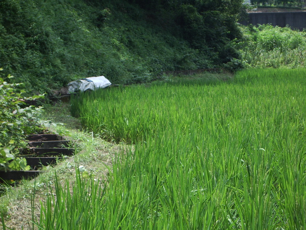 Origin of Misawagawa